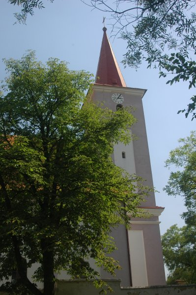 Studienka